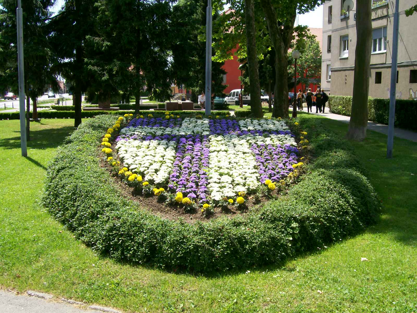 Cvijetni grb Zaprešića